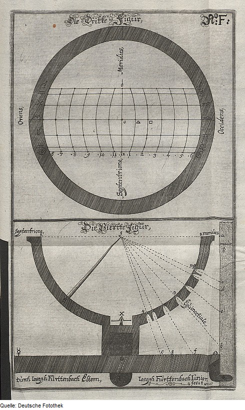 Original image description from the Deutsche FotothekUhr & Sonnenuhr